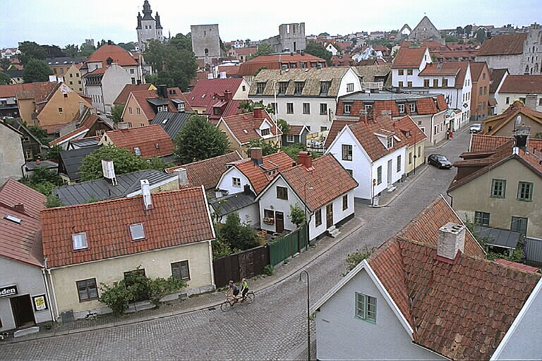 Visby från Kruttornet. Motiv: Visby Nyckelord: Riksintressen, Världsarv Kategori: StadsmiljöVisby från Kruttornet.